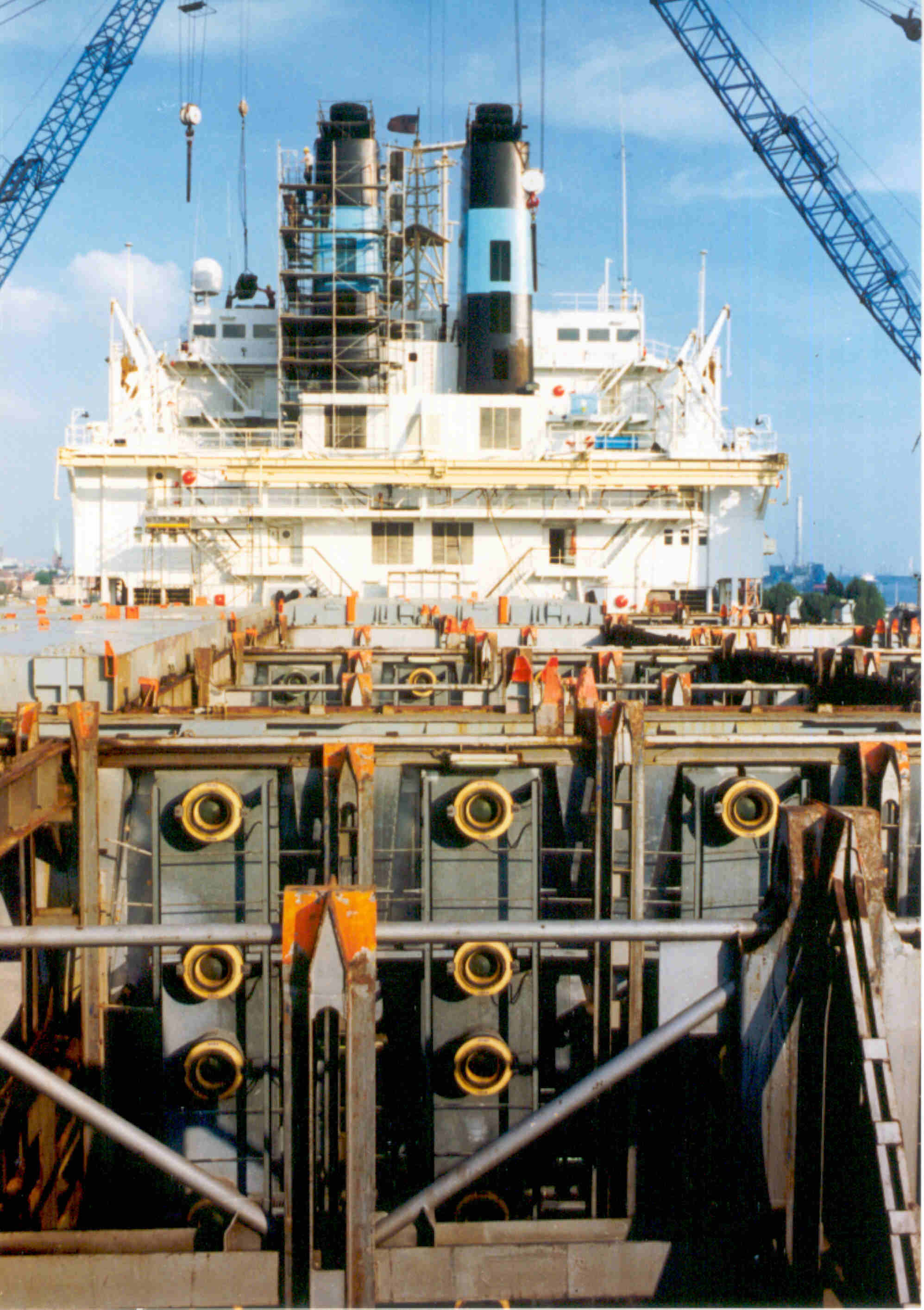 Blick auf Kühlstäbe im Schiff